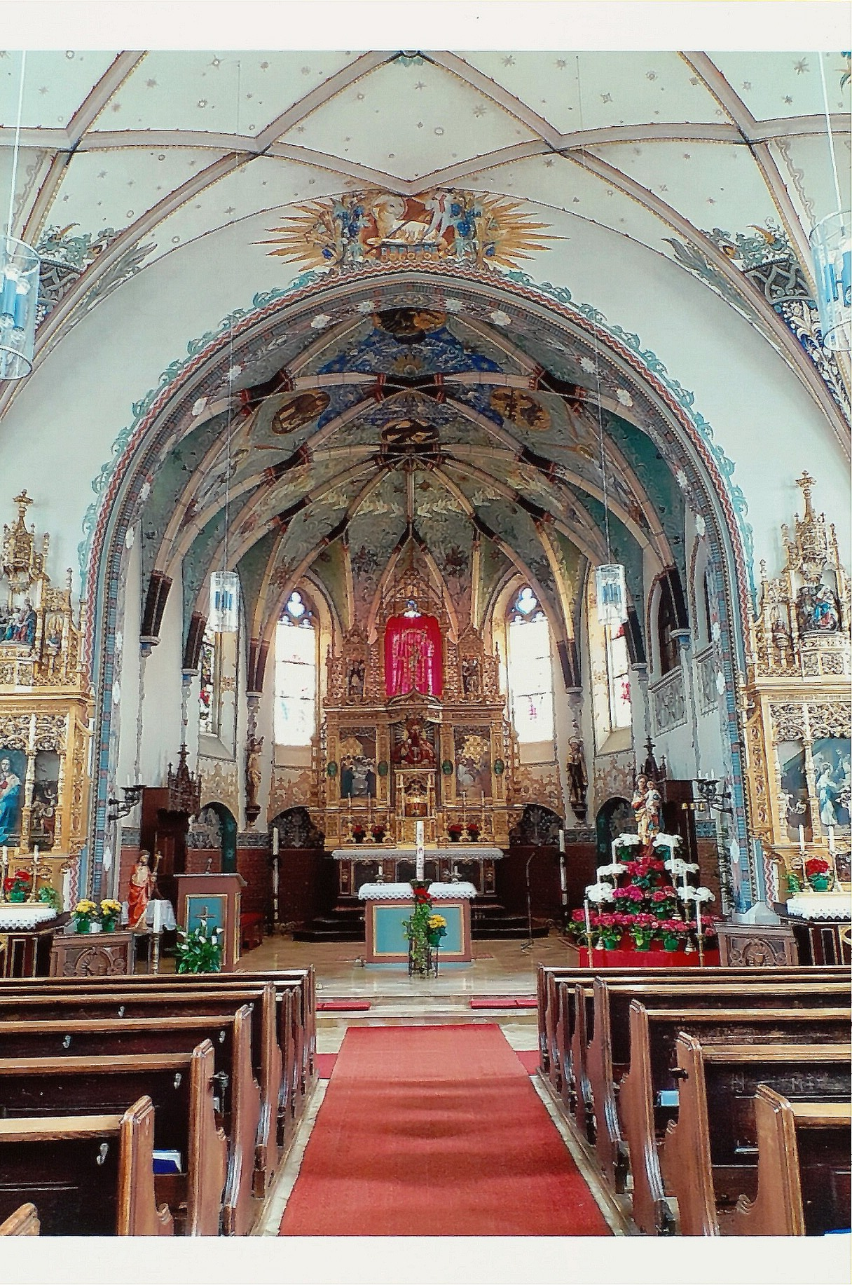 Gundelsdorf (Pöttmes), Pfarrkirche Hl. Kreuz, neugotischer Bau mit Ausstattung.